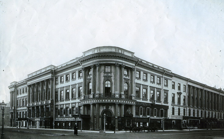 Здание на углу набережной Мойки и Невского проспекта. Дом проживания Степана Петровича Елисеева